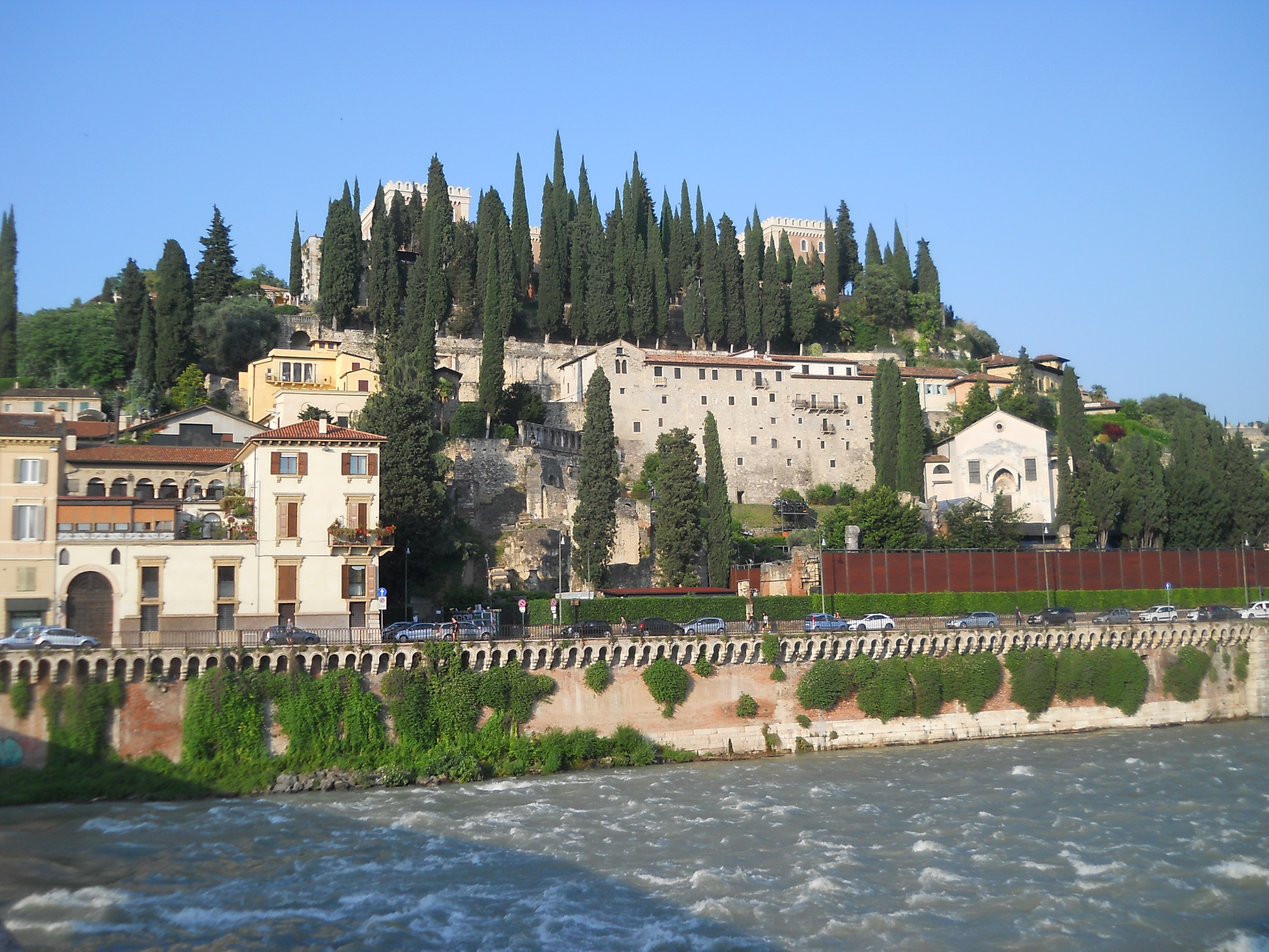 Castel San Pietro a Verona, visto dal Ponte Pietra